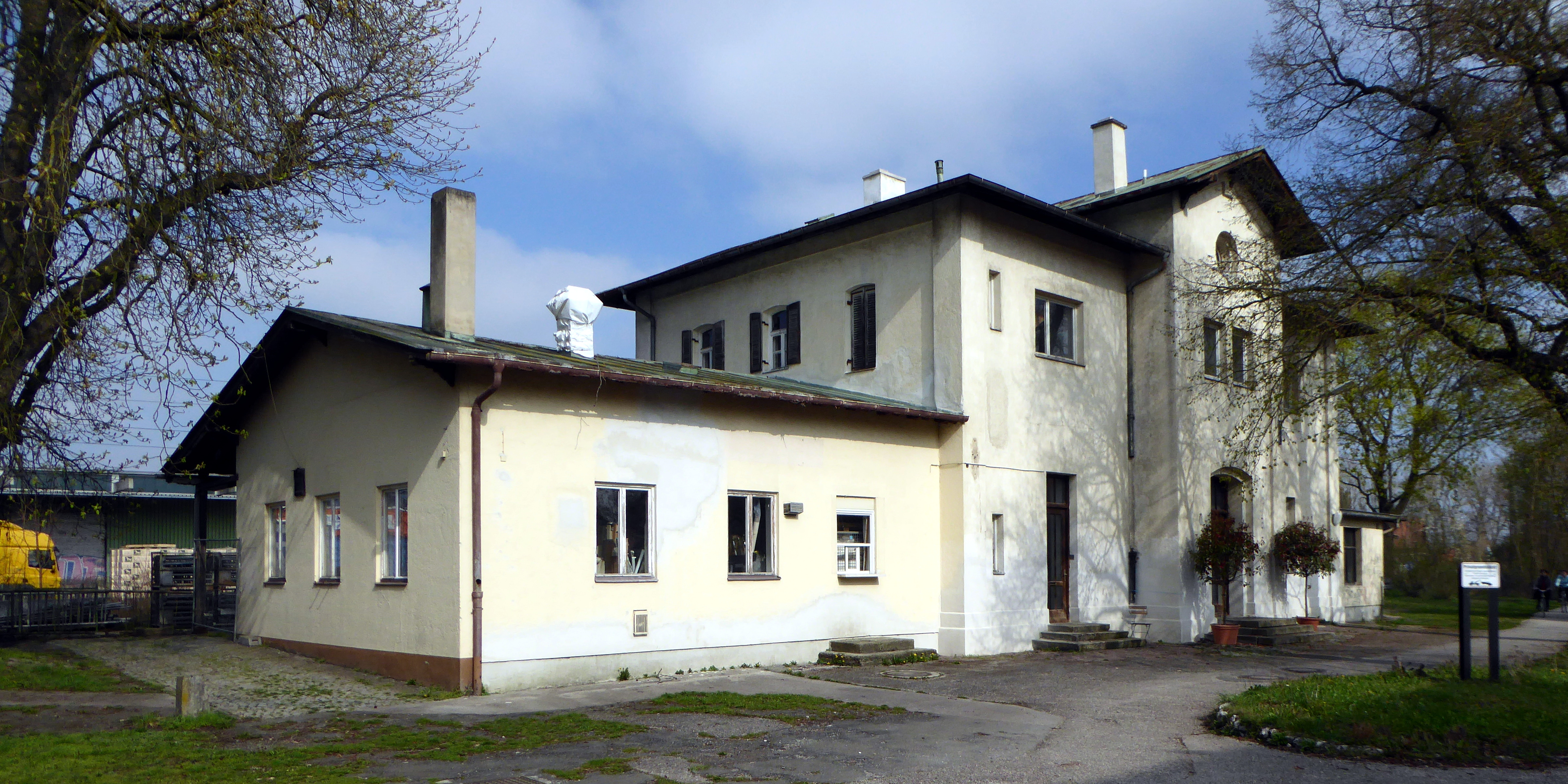 Die Süd- und Ostseite des ehemaligen Bahnhofs Schleißheim in Oberschleißheim.